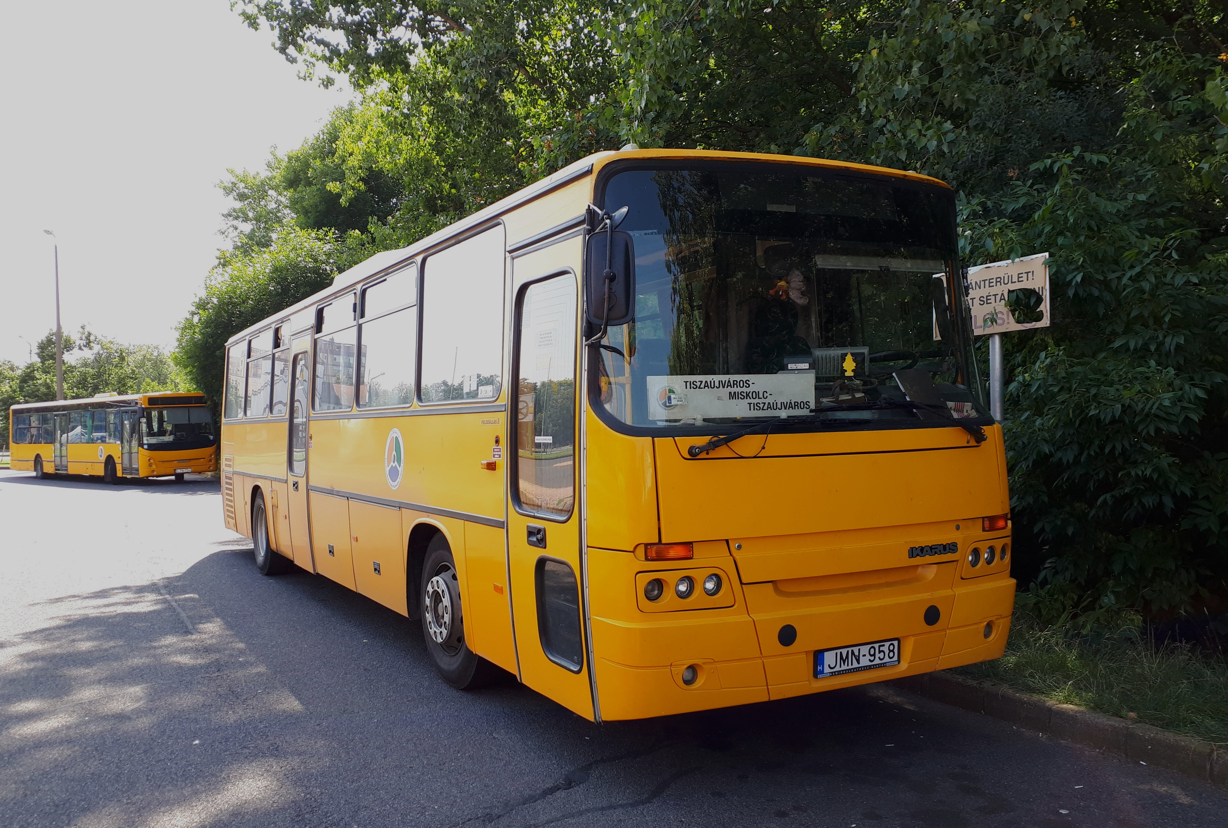 Az ÉMKK JMN-958 rendszámú Ikarus C56 típusú busza Tiszaújvárosban, a 3745-ös helyközi járaton.